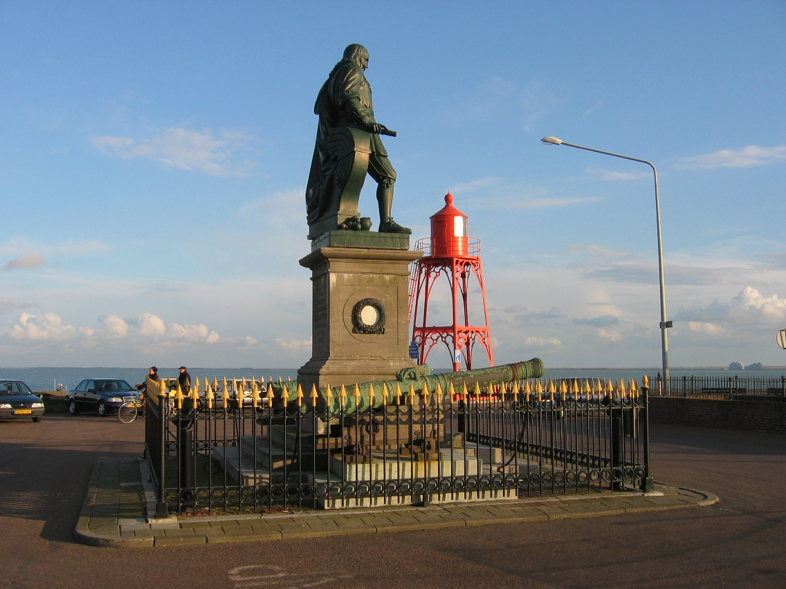 Standbeeld van michiel de ruyter op de Boulevard